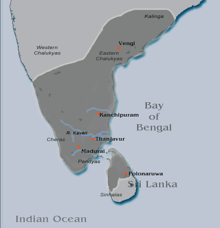 രാജരാജചോളന്റെ അധീനതയിലുണ്ടായിരുന്ന പ്രദേശങ്ങൾ